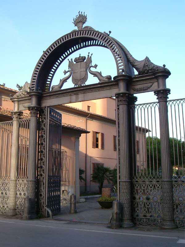 Cancello